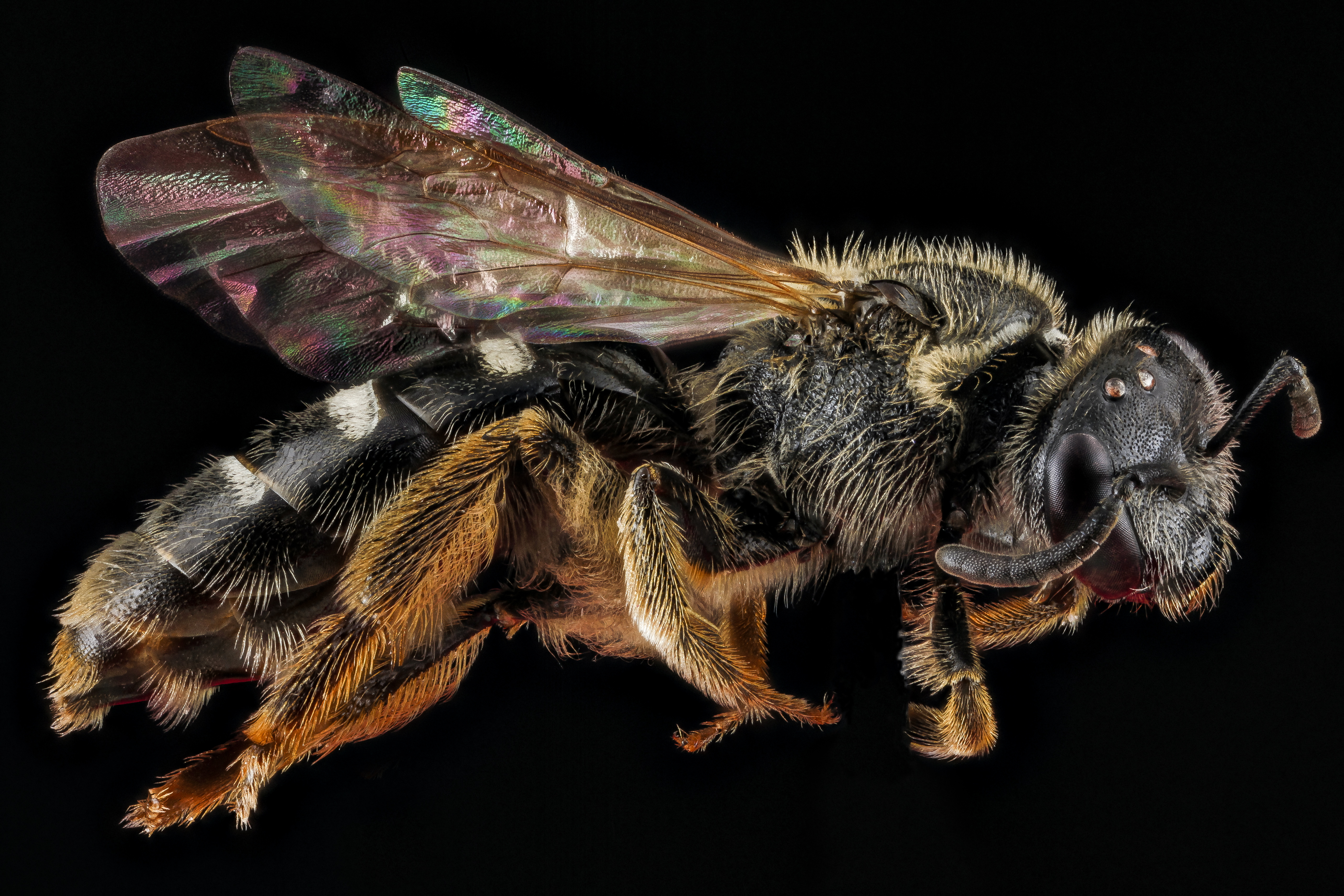 Lasioglossum truncatum, Maryland